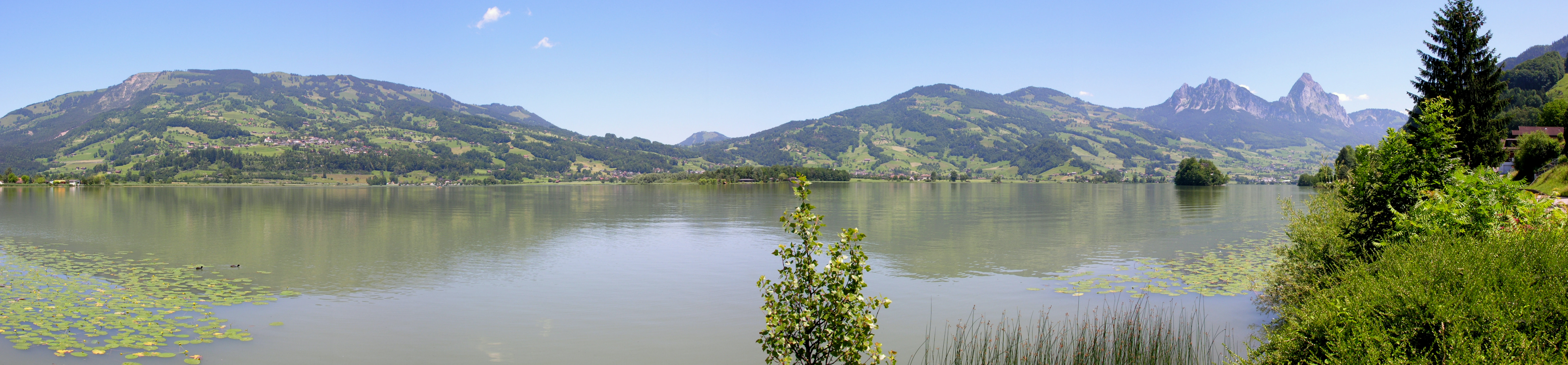 Switzerland, Kanton Schwyz, Lauerzersee